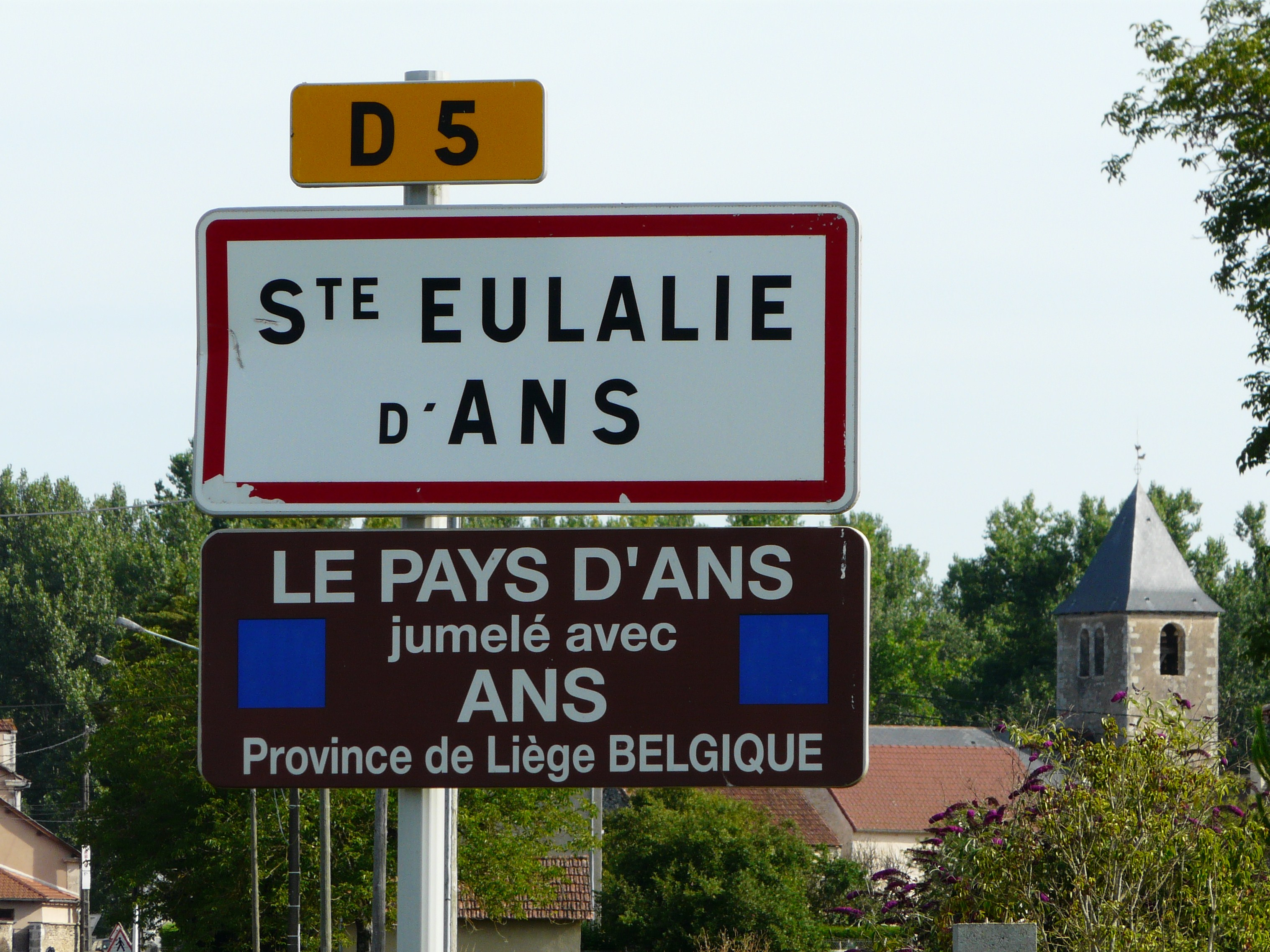 Panneau de jumelage de Sainte-Eulalie-d'Ans, Dordogne, France.